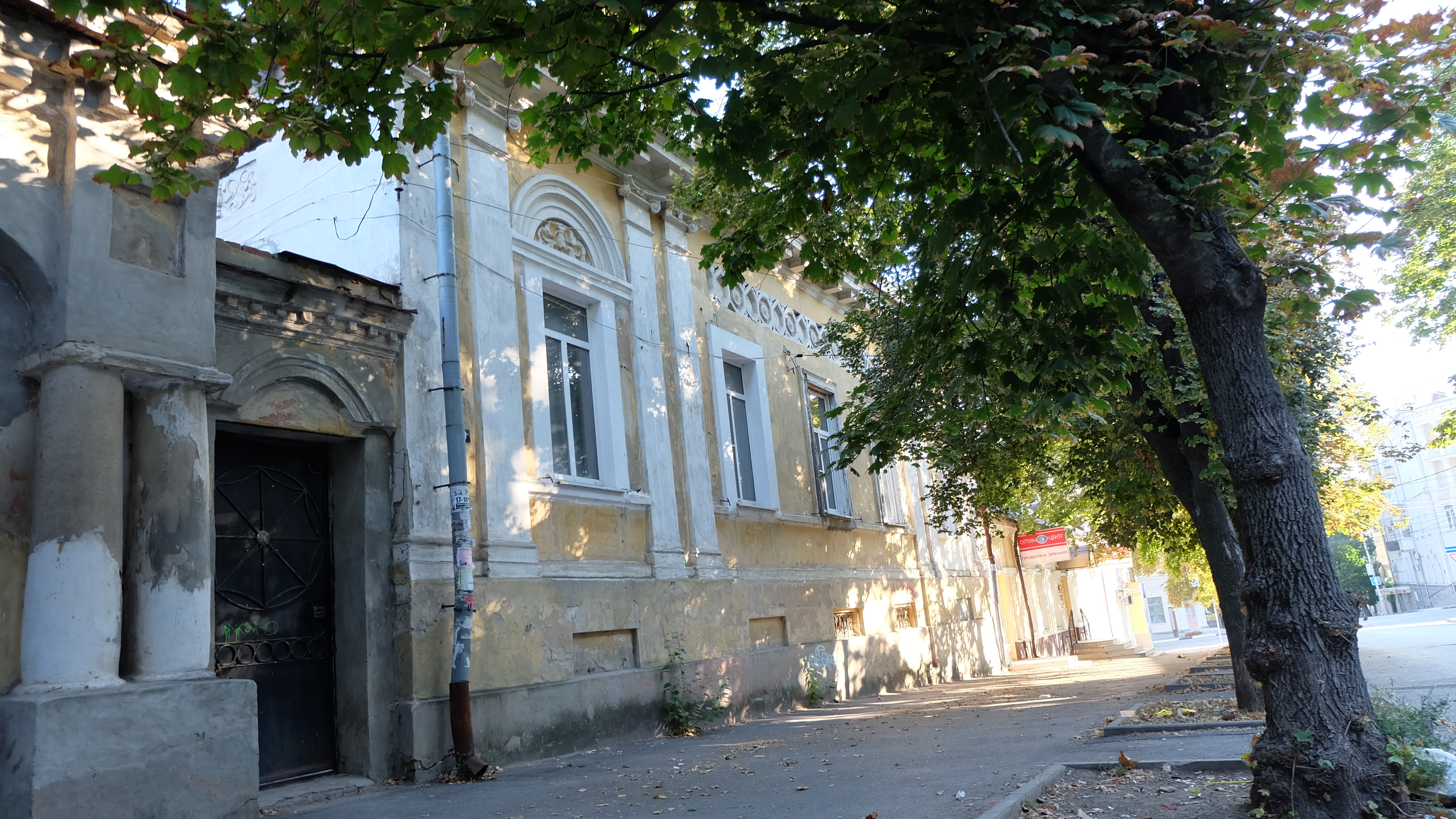 Жилой дом: переулок А. Глушко, 8, Таганрог, Ростовская область